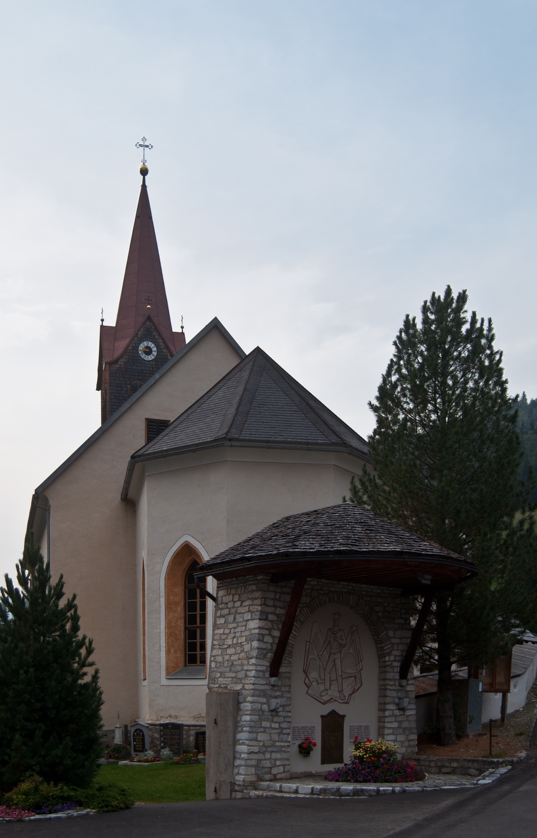 Kath. Pfarrkirche hl. Katharina und Friedhof